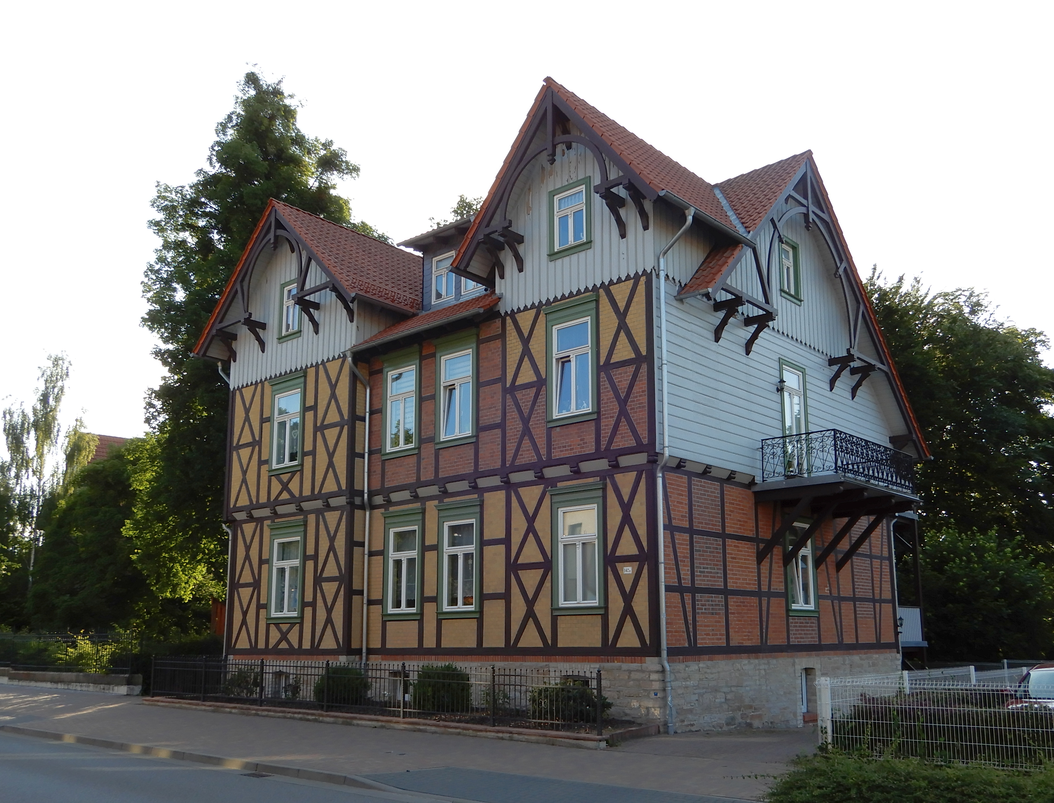 Wohnhaus in der Friedrichstraße in Hasserode